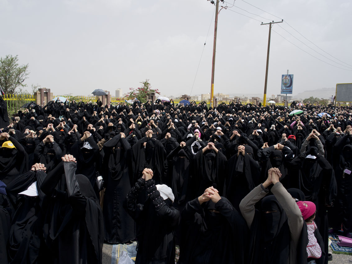 Women's side